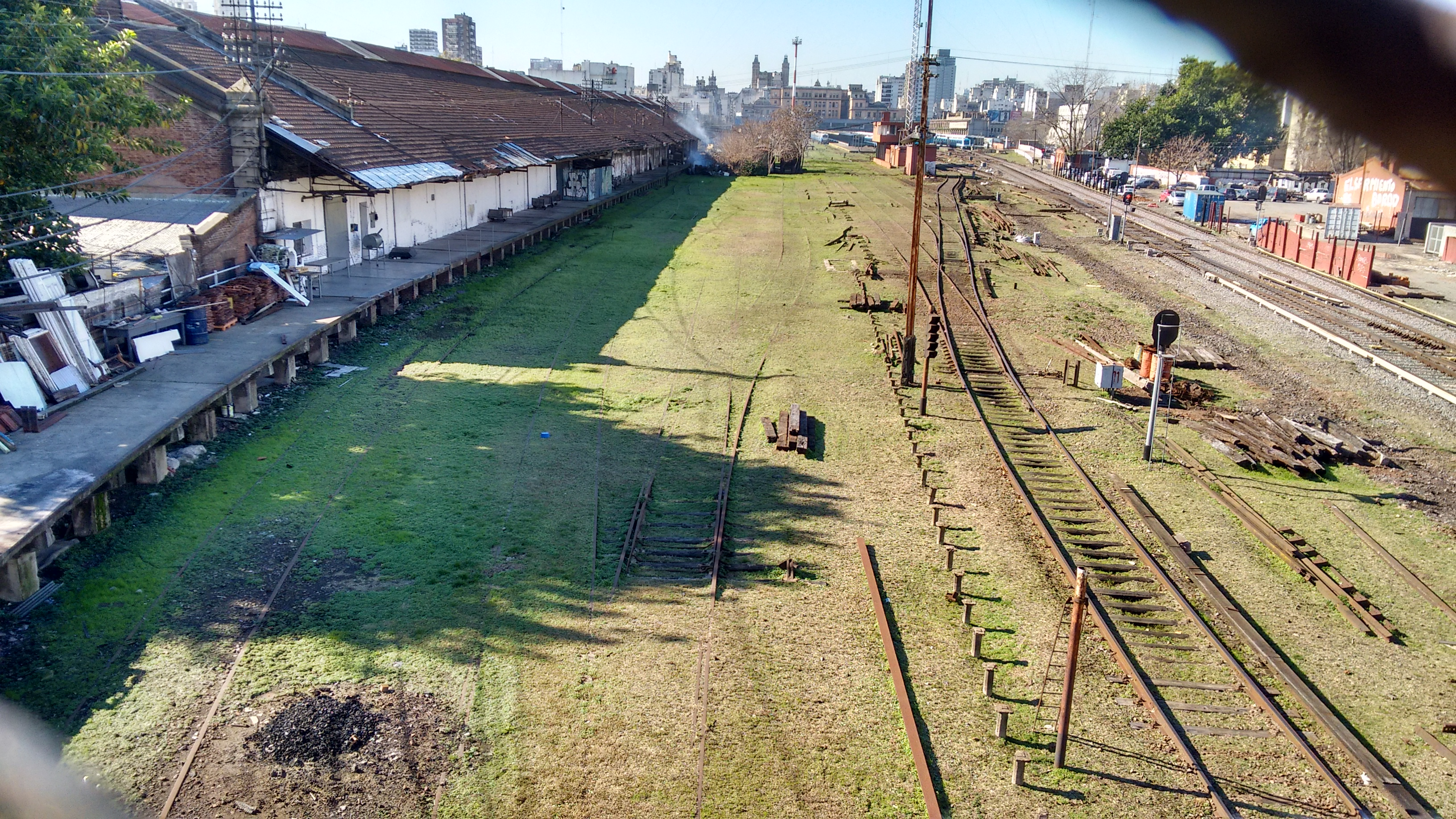 Vista de la Playa ferroviaria de la Estación Once de Septiembre